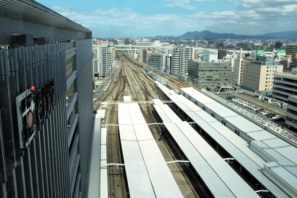 JR博多シティ屋上より博多駅構内を望む。